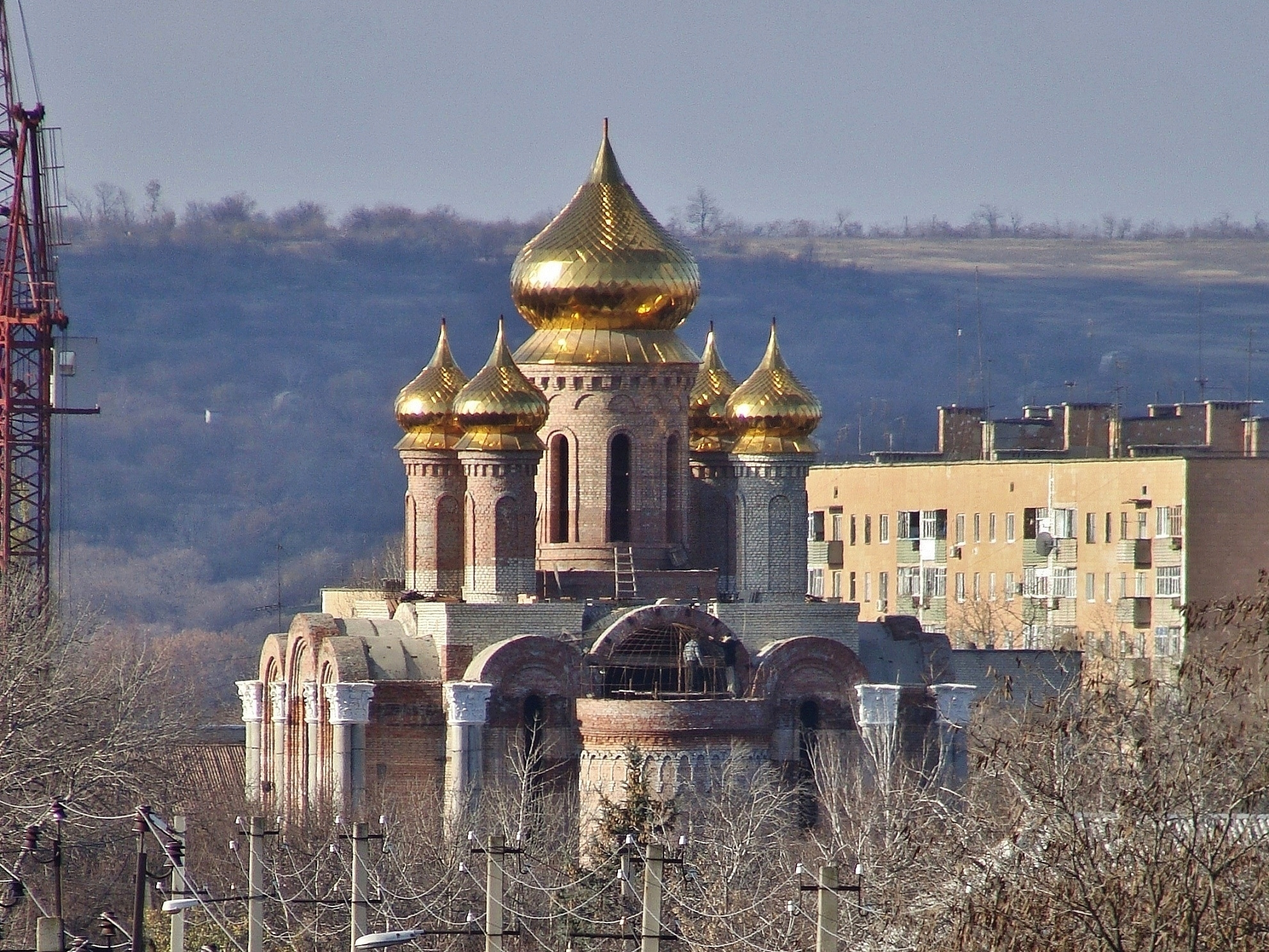 Храм Рождества Христова в Зугрэсе.